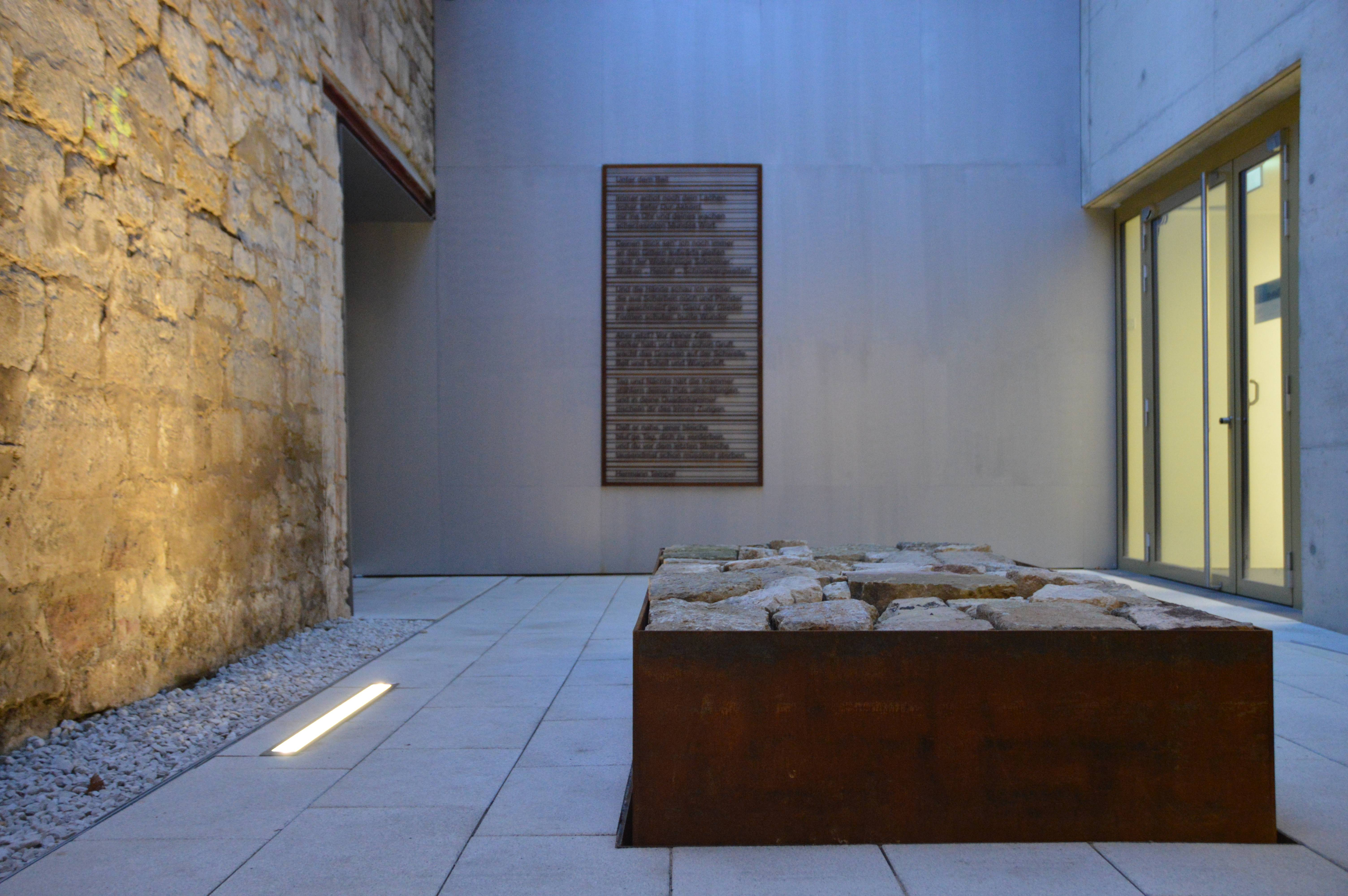 Innenhof des Dokumentationszentrums beim bundesweiten Aktionstag "Lichter gegen die Dunkelheit" am 27. Januar 2020